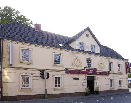 Das Bauwerk "Gasthaus Zur Post" auf der Köln-Aachener-Straße 60 in Bergheim Quadrath-Ichendorf.